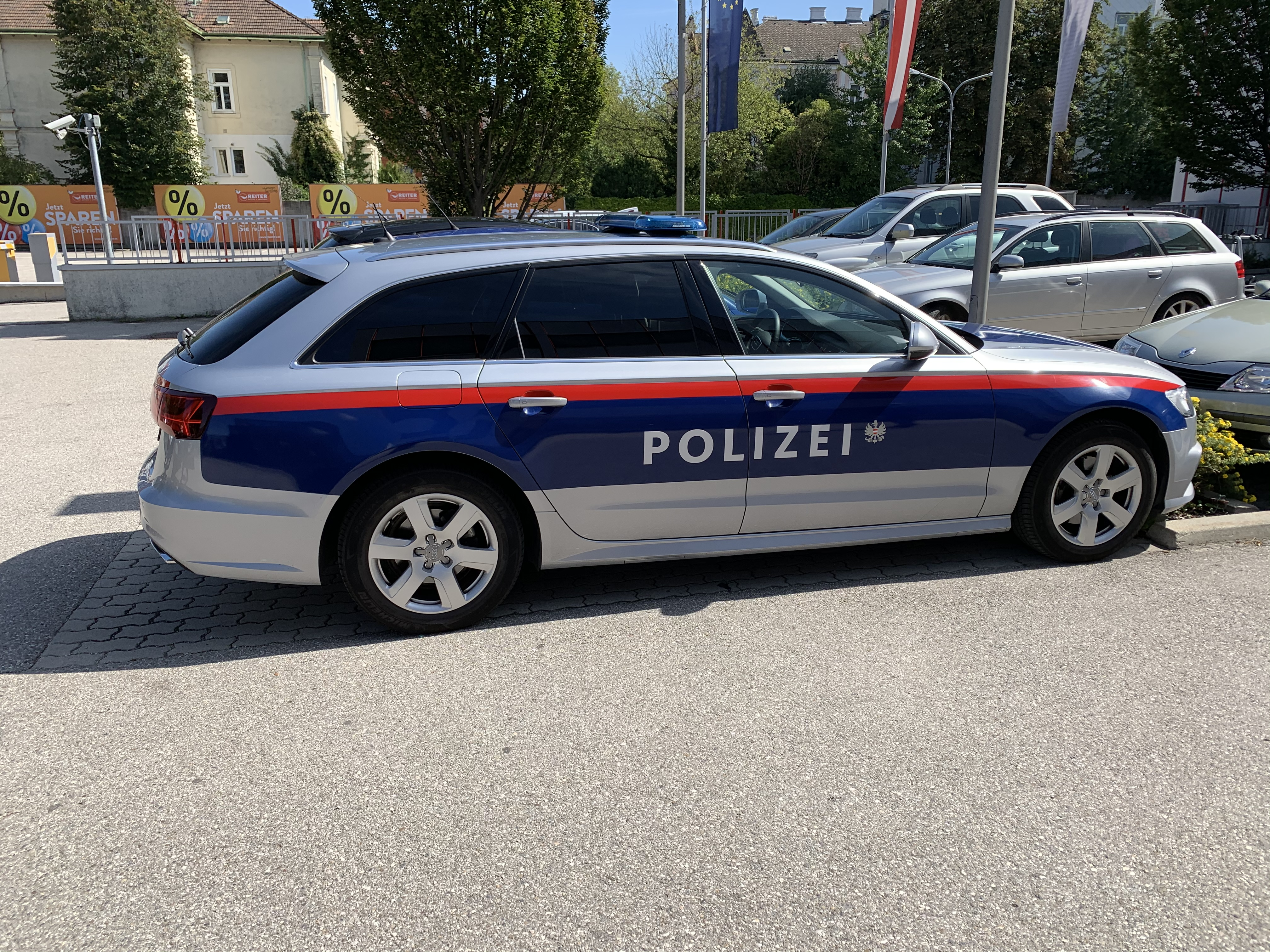 Streifenwagen Audi A6 mit neuem Blaulicht der österreichischen Polizei.